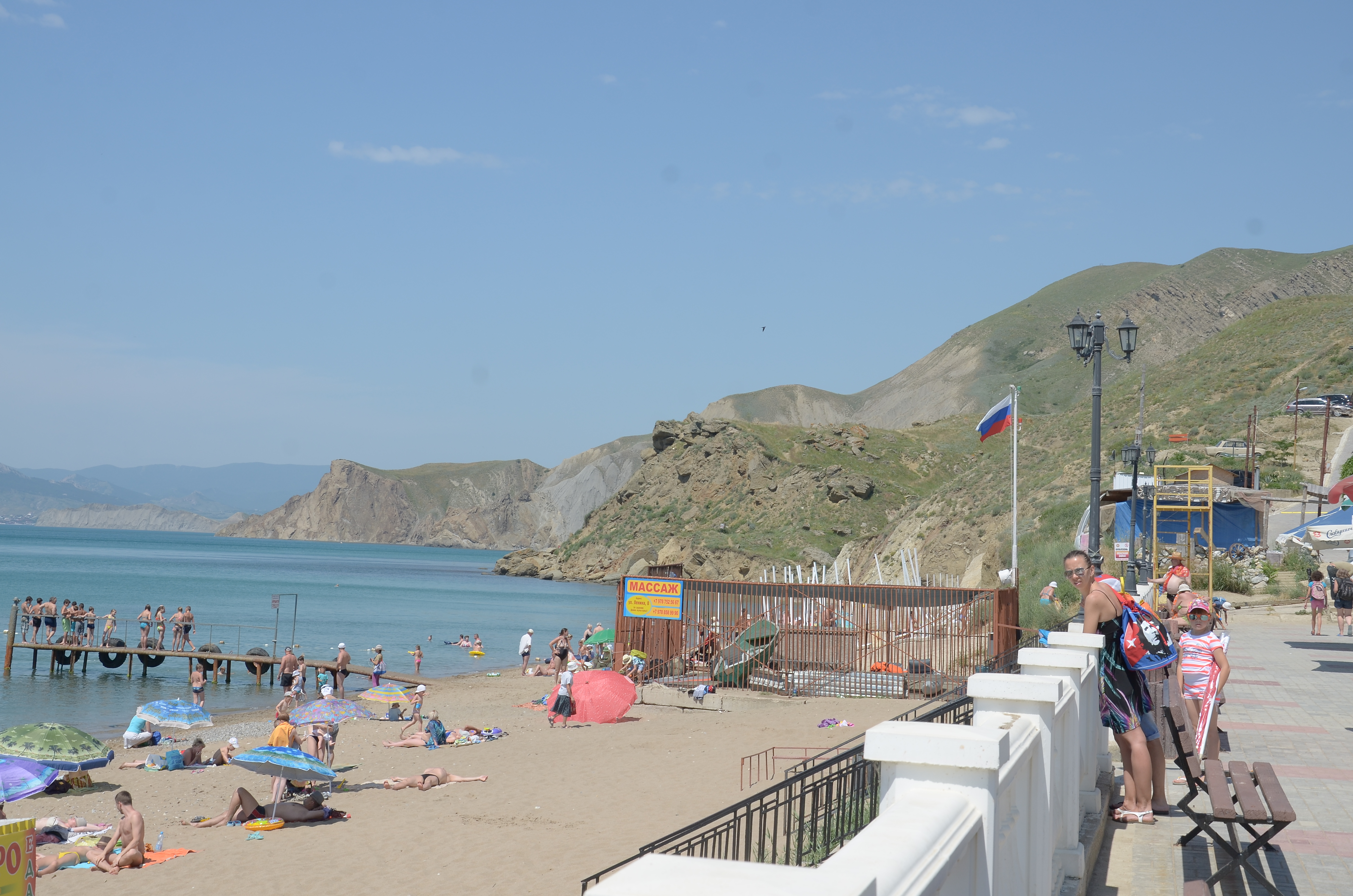 Орджоникидзе